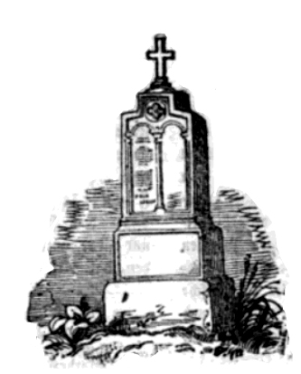 Zeichnung des von der Witwe Clara Dorothea Müller, geborene Bünemann, 1838 gesetzten Grabdenkmals für ihren am 26. Juli 1837 in München verstorbenen Ehemann, den Herausgeber des Bayerischen Landbötin Carl Friedrich August Müller auf dem Alten Südfriedhof in München ...